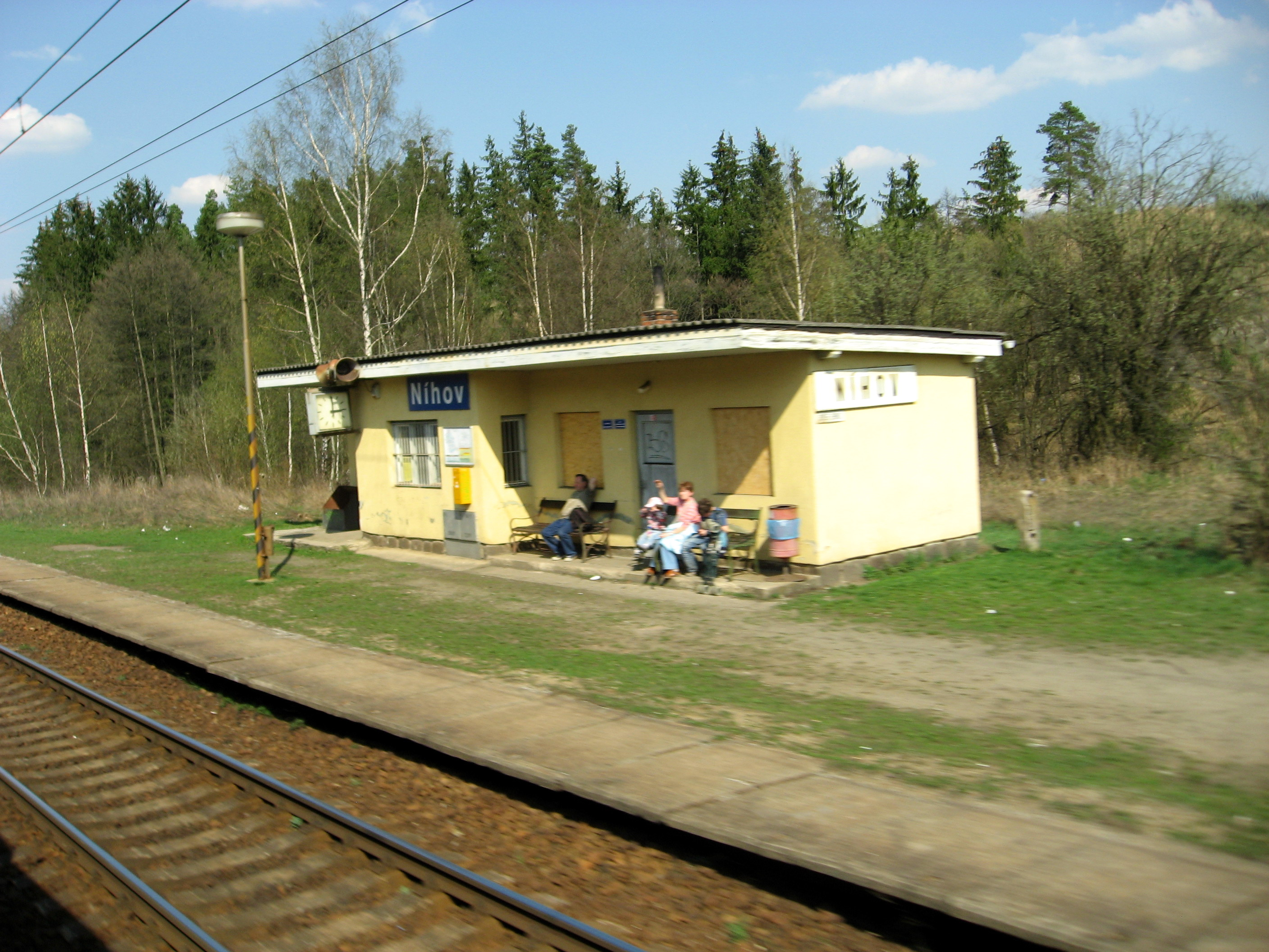 Níhov, železniční stanice